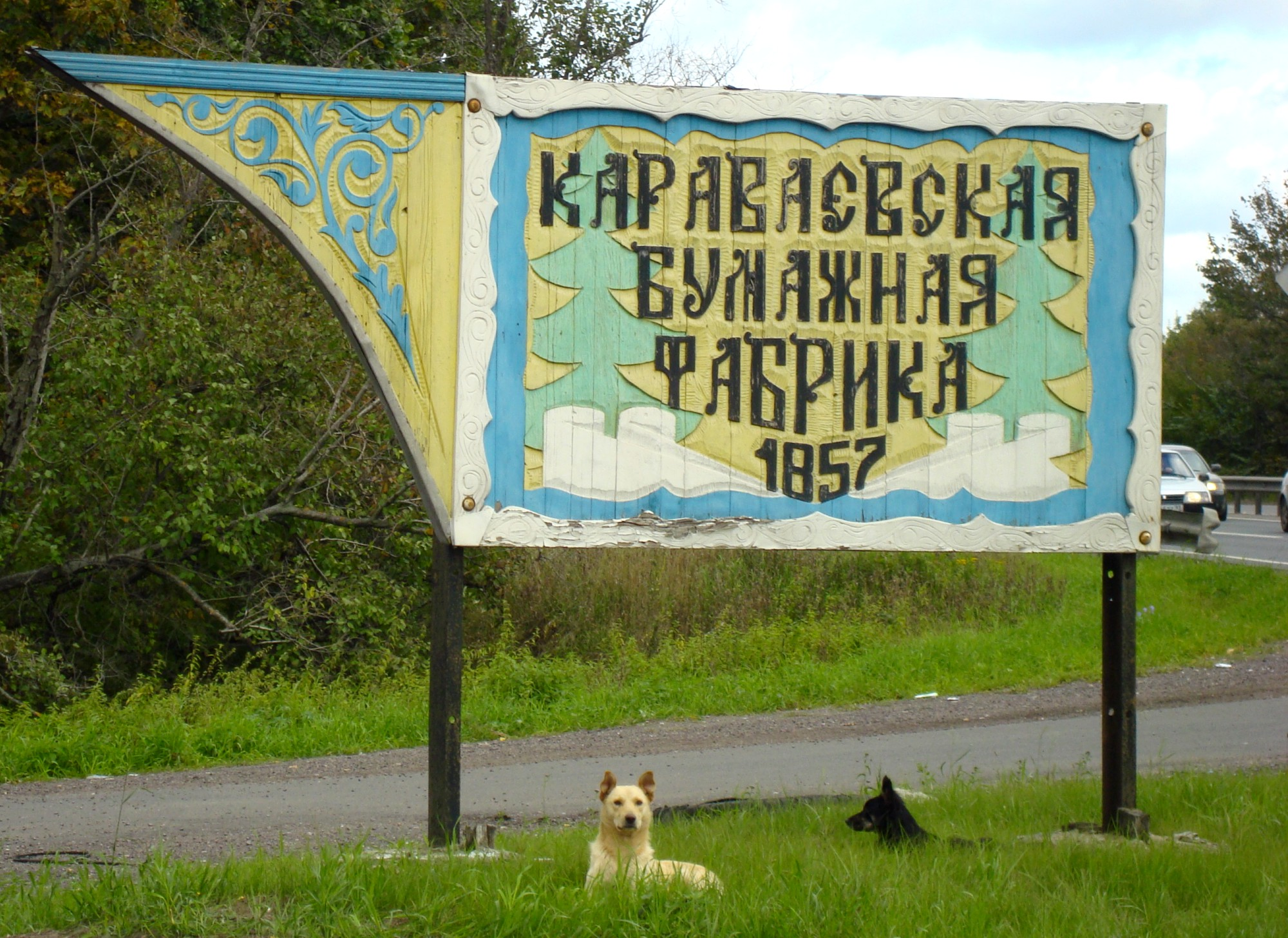 Указатель в Богослове. Моск. обл. Unknown